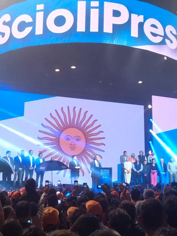 22.0PM Habla Scioli. "No queremos volver al endeudamiento, y que no privaticen"